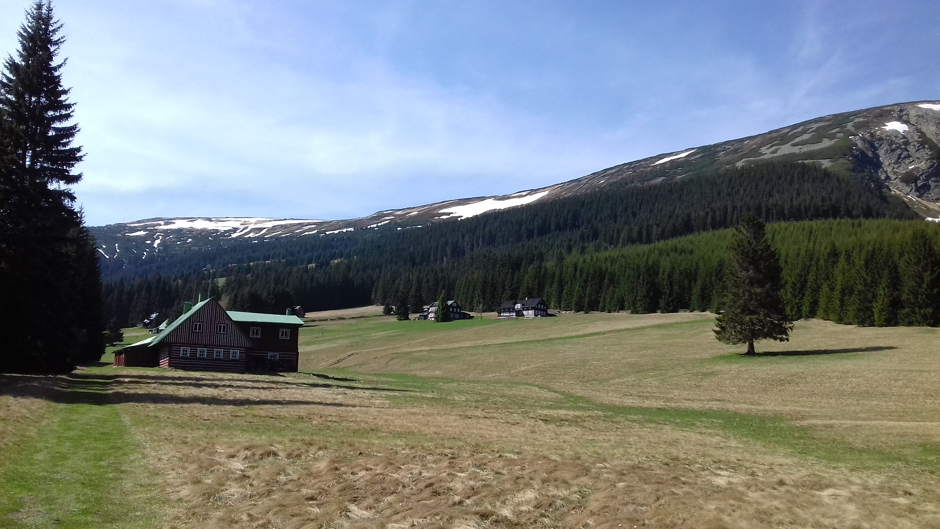 boudy v Modrém dole (od rozcestníku turistických cest)